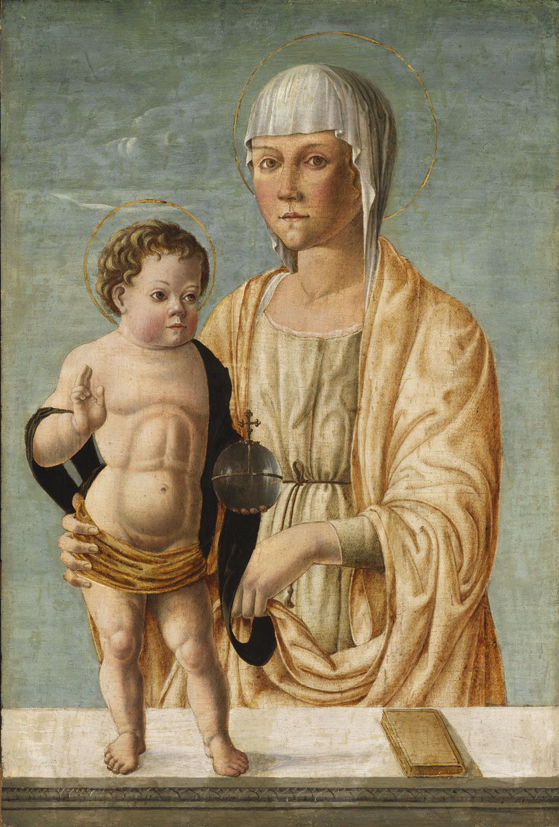 Bono da Ferrara - Madonna e Bambino olio su tavola dim 74.1 × 50.4 cm Museo Belle Arti, Budapest